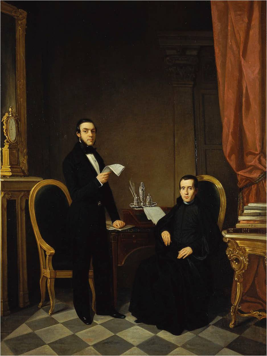 Retrato conjunto del filósofo y teólogo Jaime Balmes (1810-1848), y del filósofo y politico Juan Donoso Cortés (1809-1853).